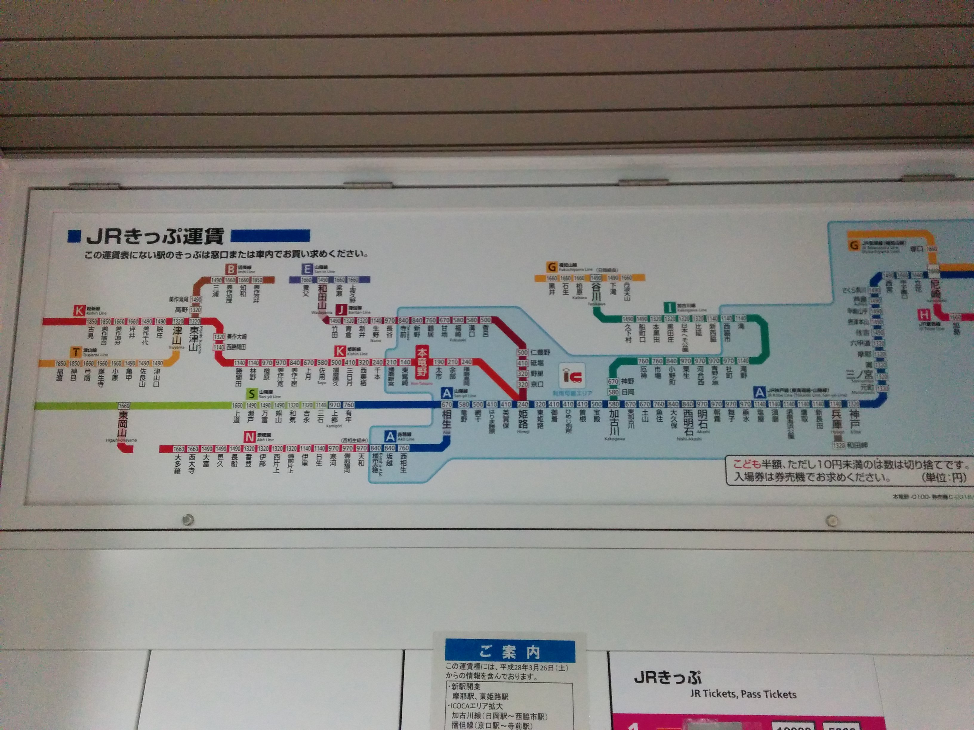 近畿統括本部/神戸支社・岡山支社管内とも姫新線全区間が朱色+Kとなっている運賃表